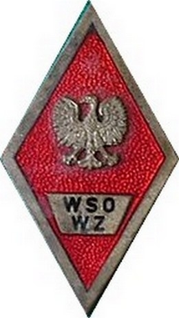 Absolventenabzeichen der "Offiziershochschule der Mechanisierten Infanterie" in Wrozlaw.